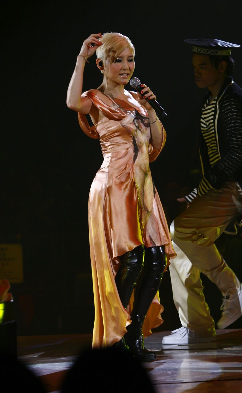 劉美君 大開色戒演唱會 2008年4月20日